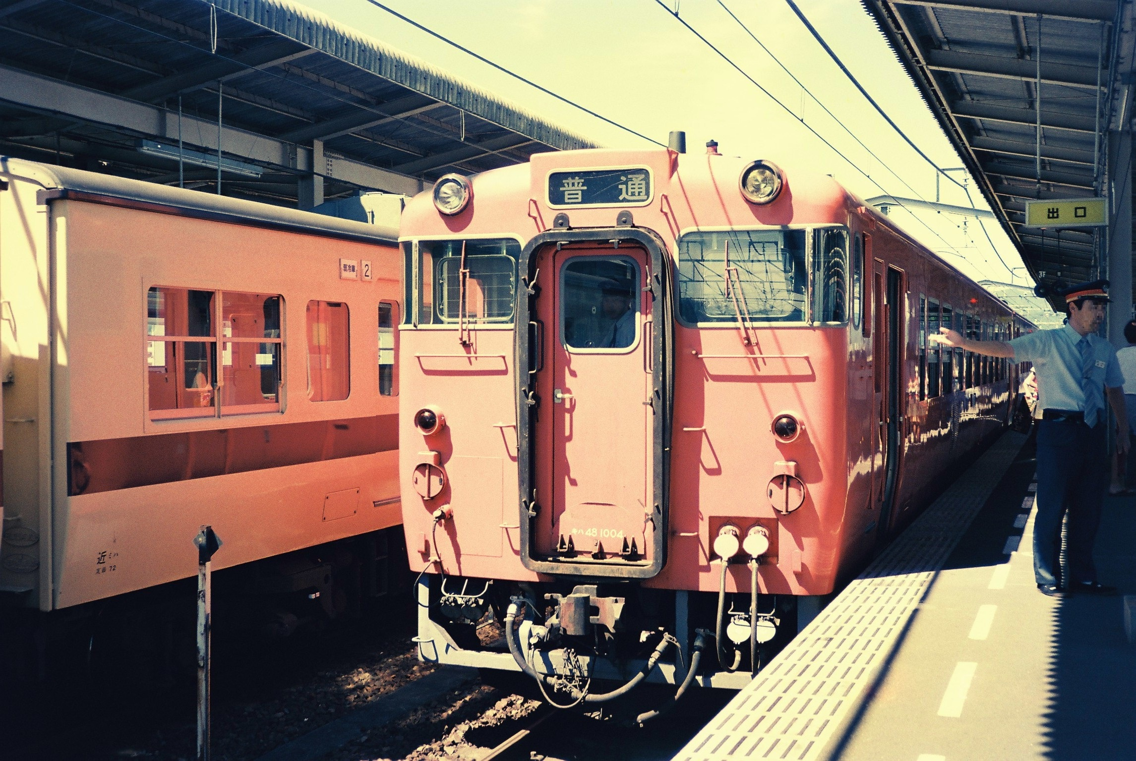 湖西線近江今津駅に停車中のキハ48 1004（1987年8月撮影）